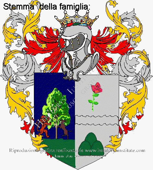 Stemma famiglia Gucci-Boschi (riproduzione grafica realizzata da Heraldrys Institute of Rome)